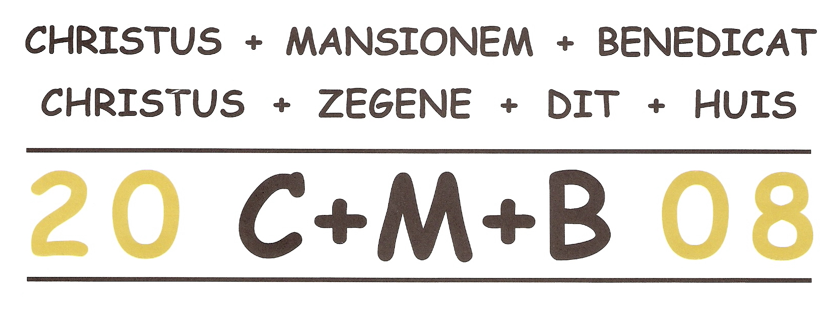 afkorting C+M+B of K+M+B voor huiszegen 'Christus Mansionem Benedicat' in gebruik bij met Driekoningen / Epiphanie; auf